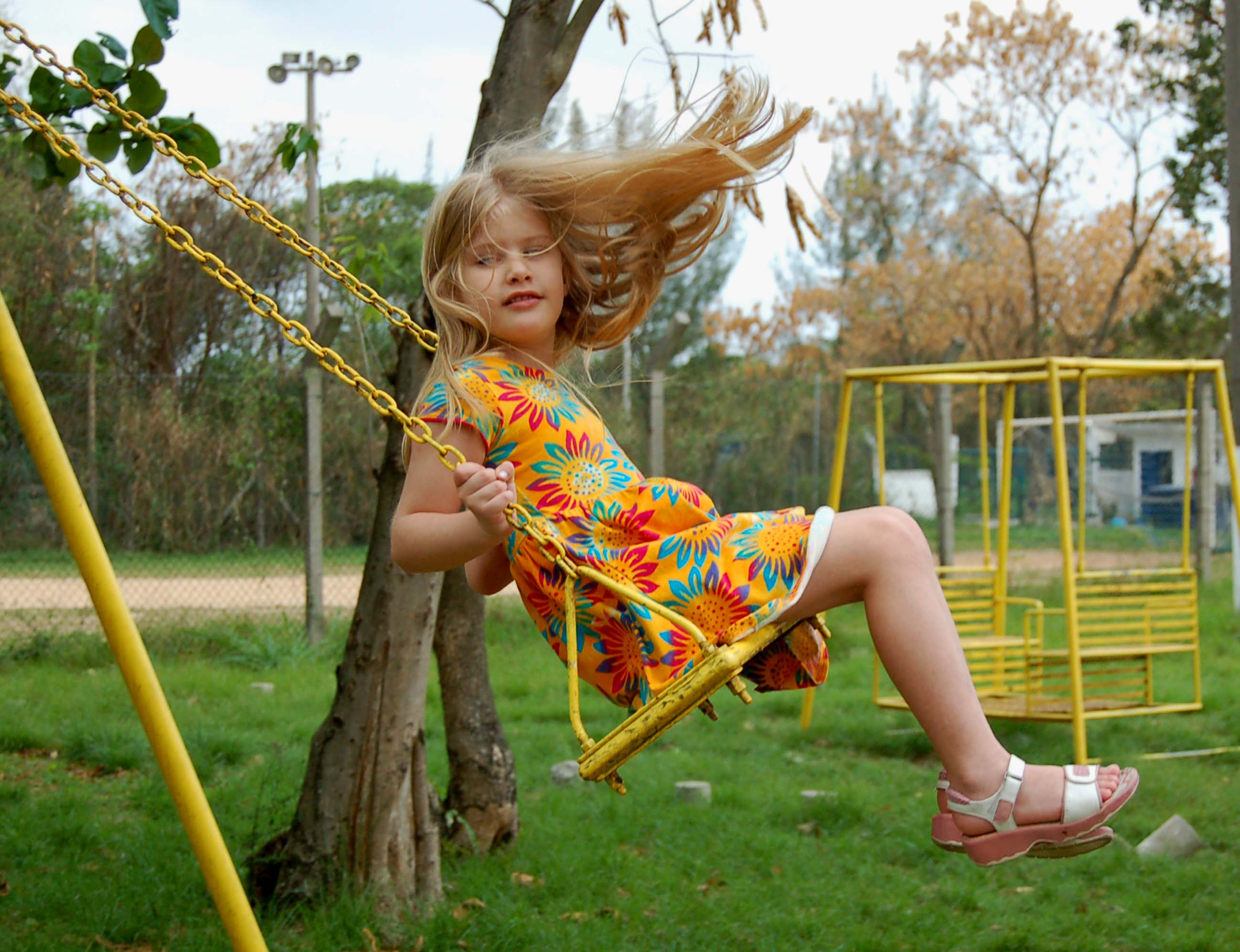 A girl on a garden swing. Original caption: Bincadeira de criança eu também me acabei nesse balanço...